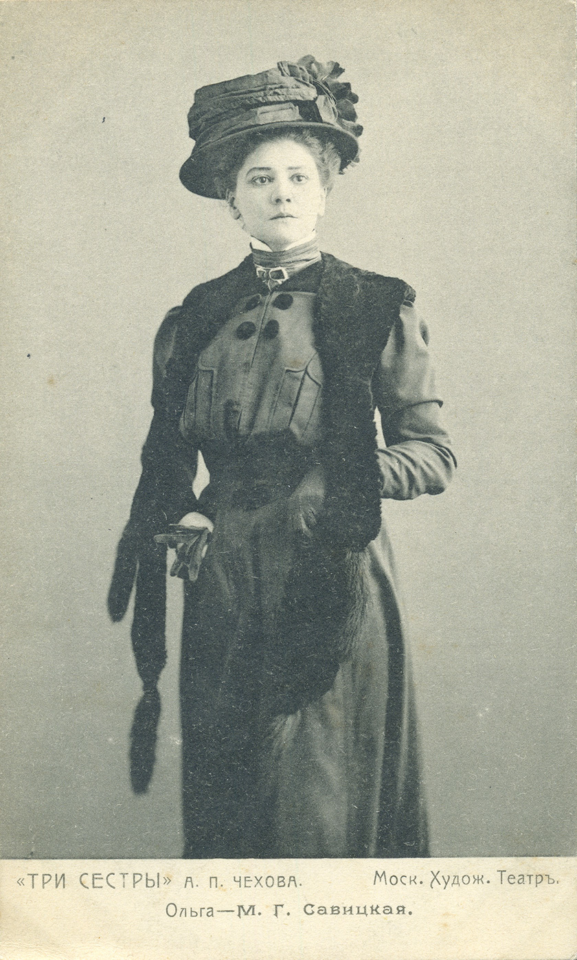 Маргарита Савицкая в роли Ольги в спектакле «Три сестры» по пьесе Антона Чехова